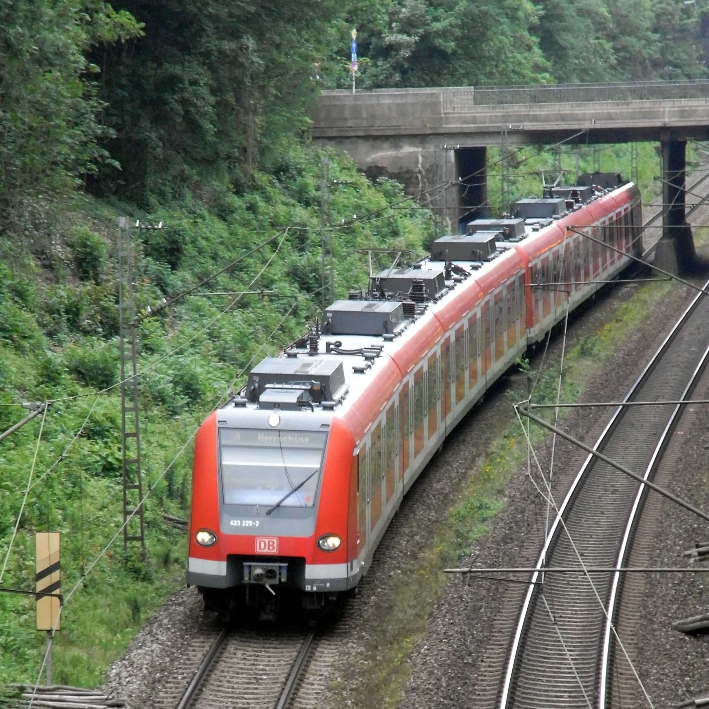 S-Bahn der Linie S 8 nach Herrsching auf dem Münchener Eisenbahnsüdring anlässlich von Bauarbeiten und Stammstreckensperre zu Pfingsten 2011